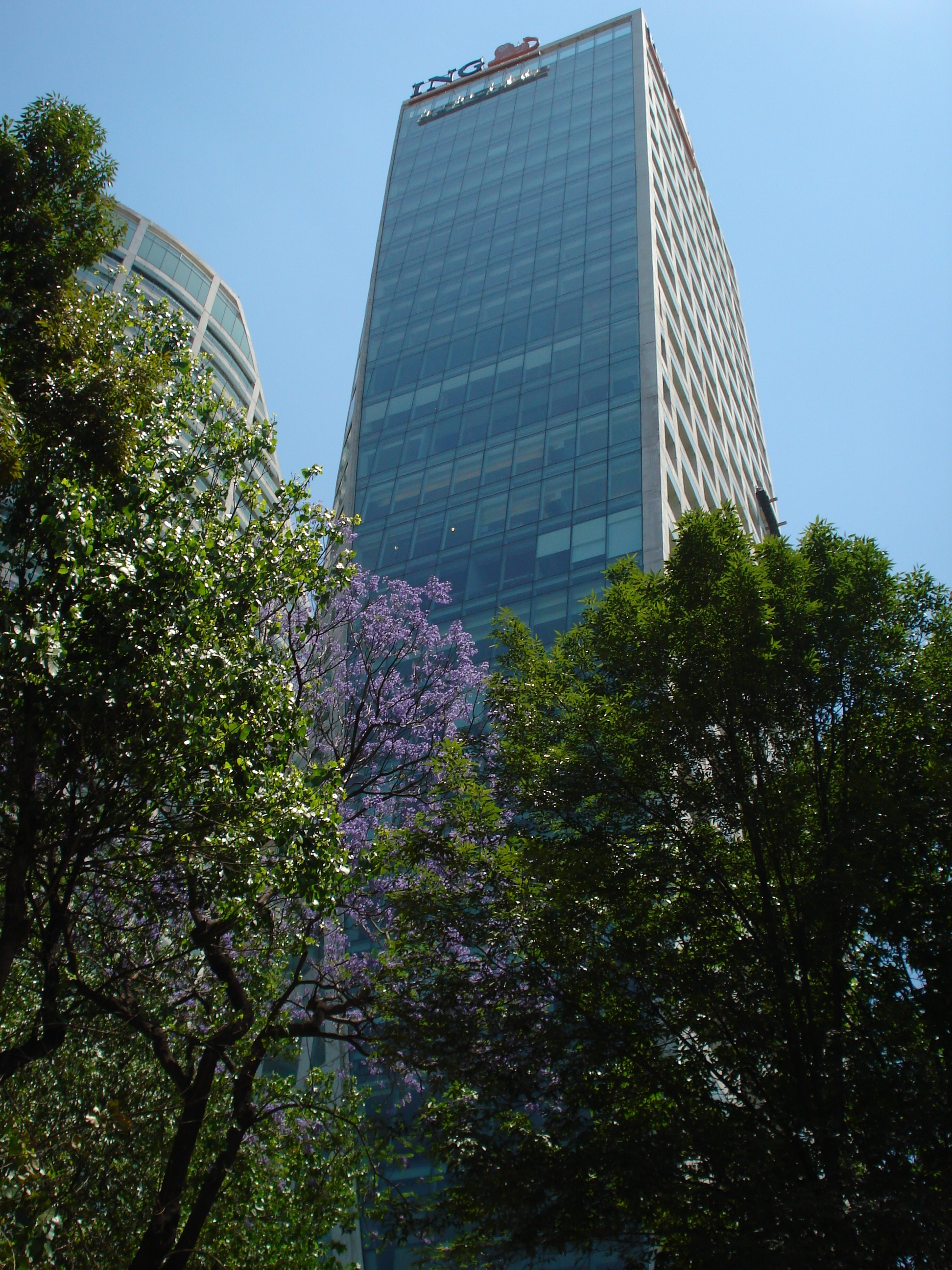 Torre 2 Reforma 222, Ciudad de México.